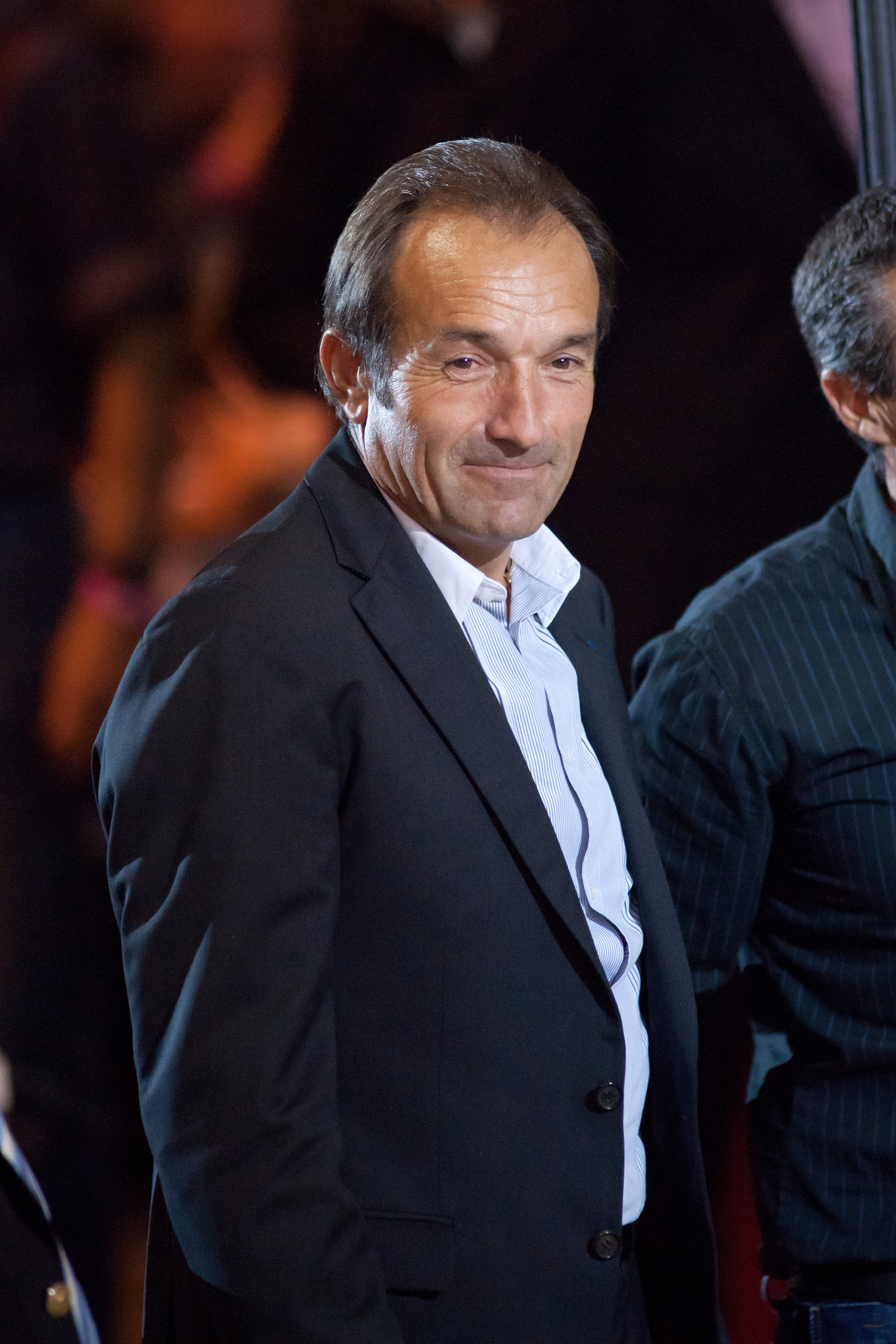 Gilbert Duclos-Lassalle lors des six jours de Grenoble 2011.